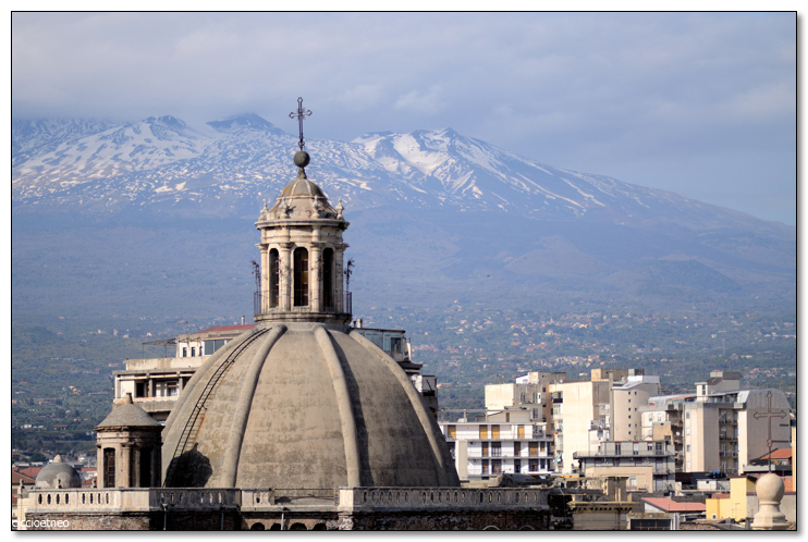 Paternò - SS. Annunziata's Monastery